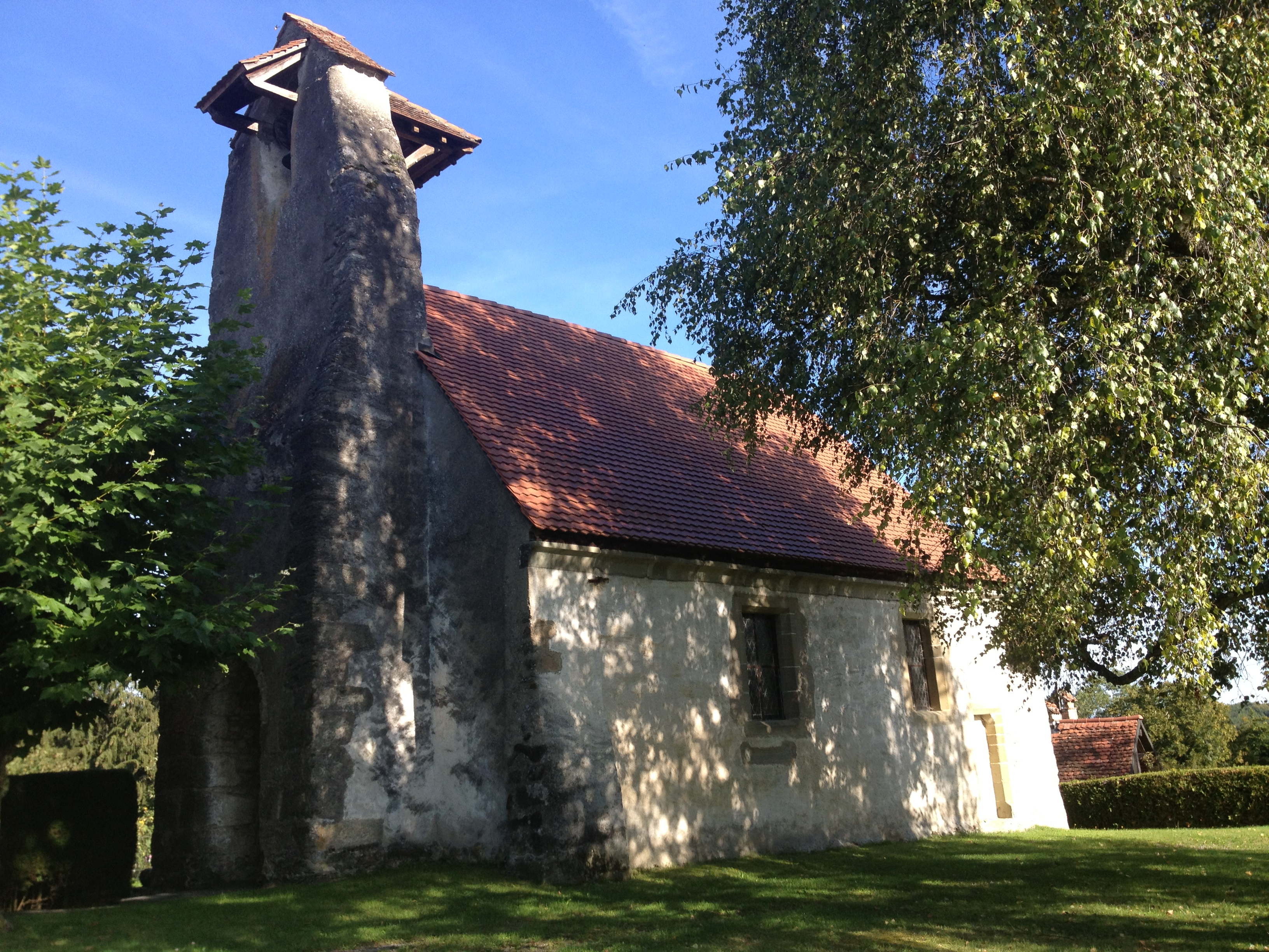 L'église Saint-Georges de Villarzel, dans le canton de Vaud en Suisse.